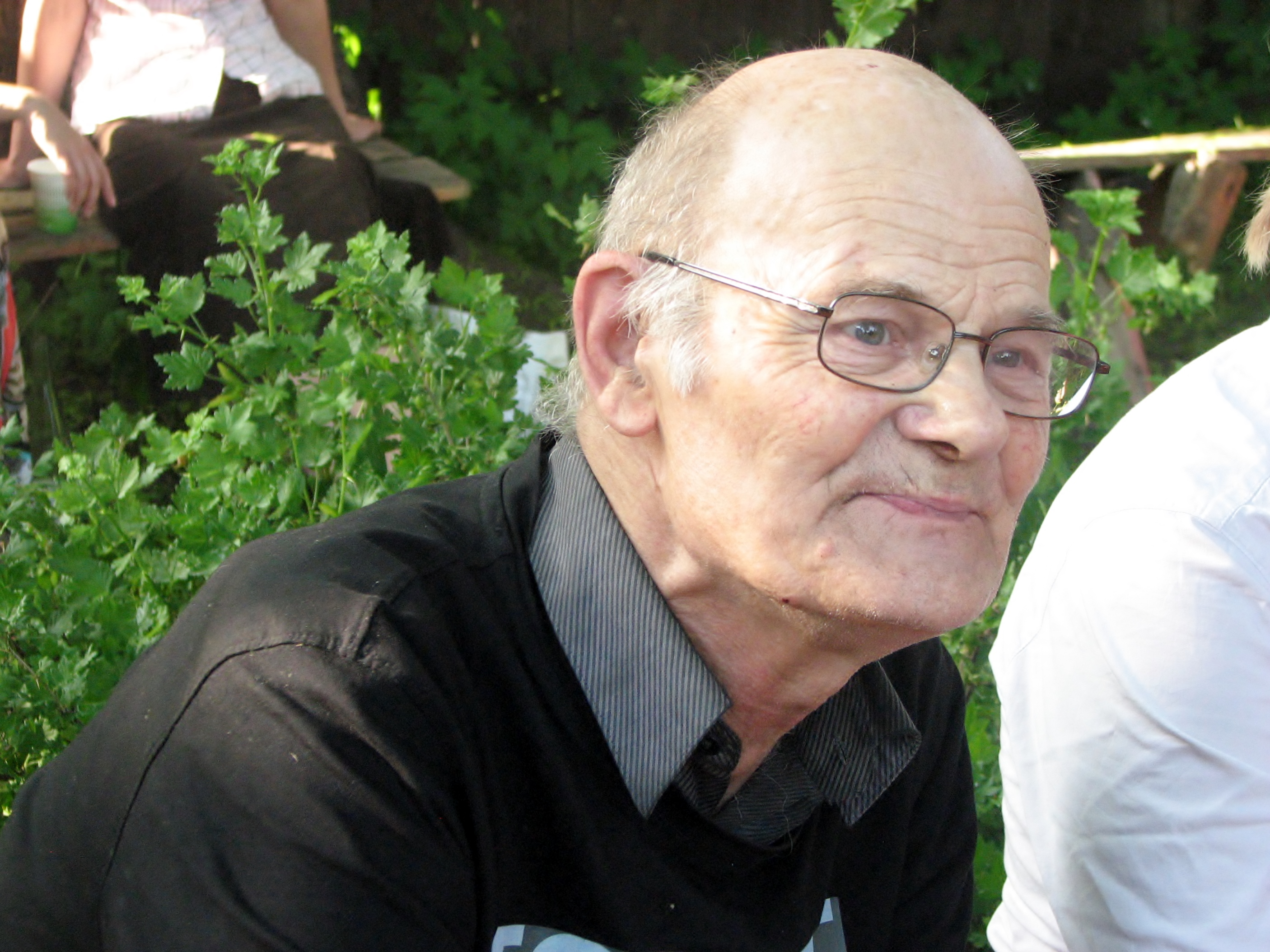 Jaan Klõšeiko kirjandusfestivalil HeadRead